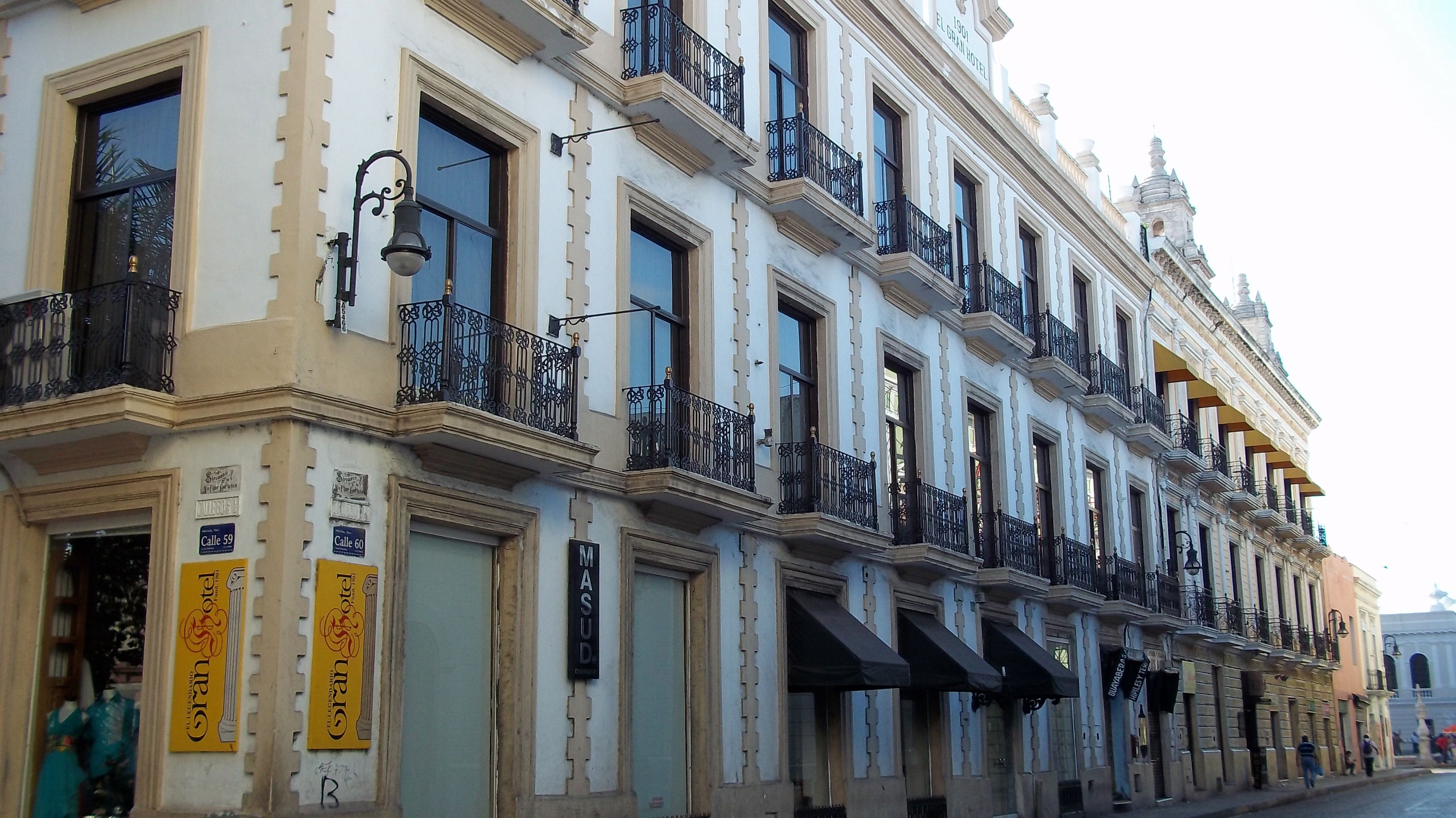 Calle 60, en Merida, Yucatan en enero de 2012